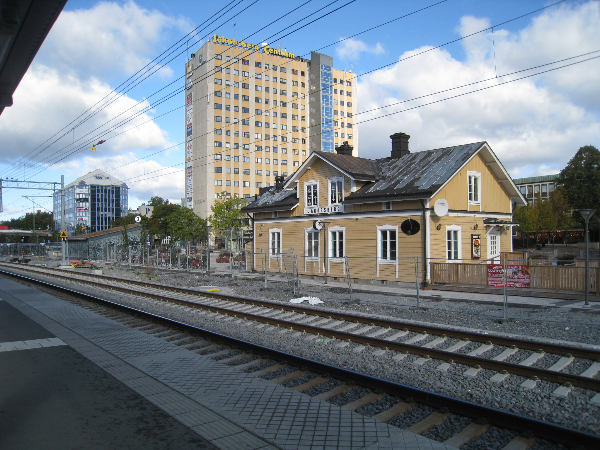 Jakobsberg Centrum i Järfälla kommun, Stockholms län, med posthuset och stationshuset.